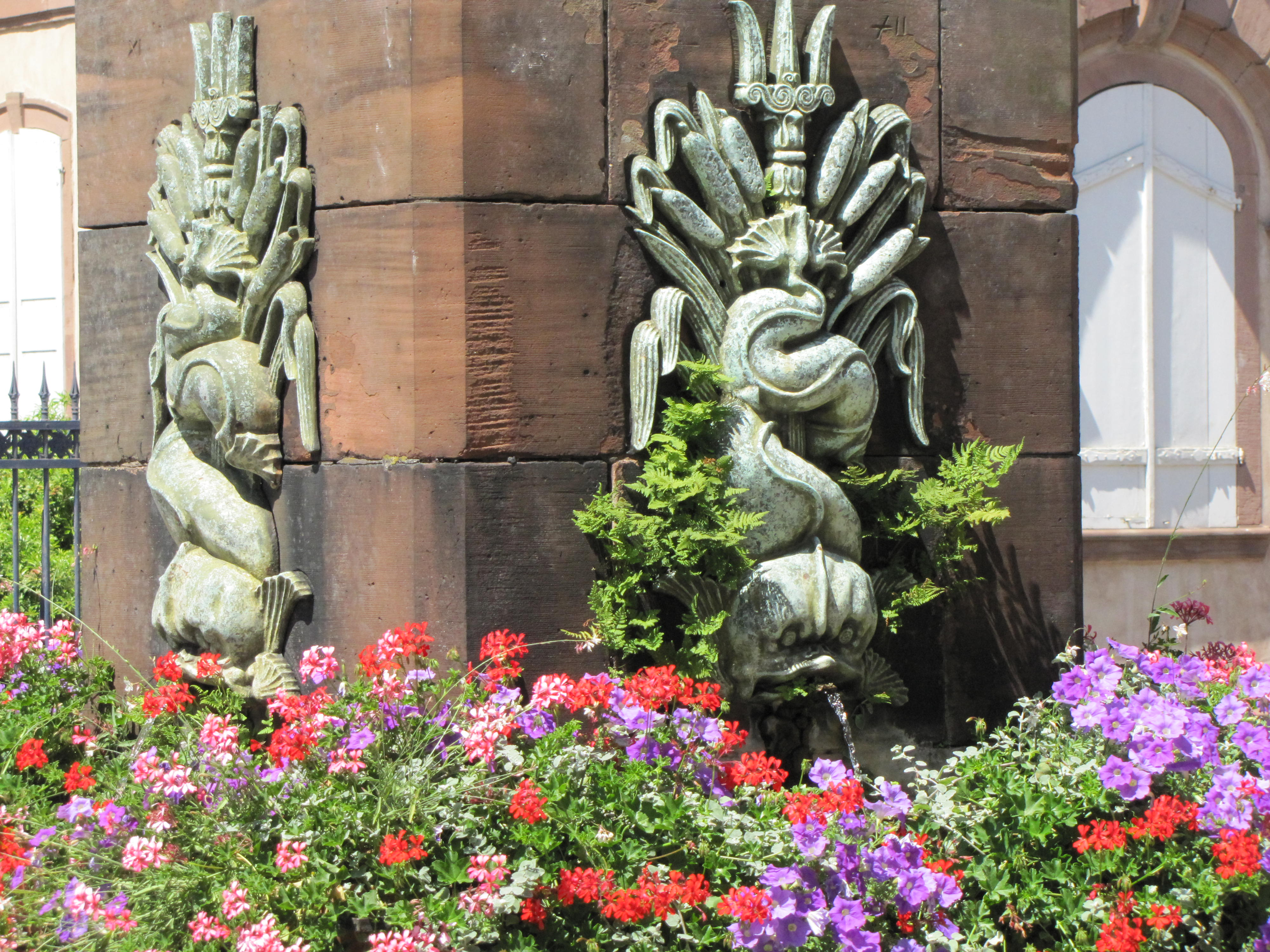 Alsace, Bas-Rhin, Haguenau, Fontaine aux Dauphins (XIXe), place d'Armes (IA00062008).